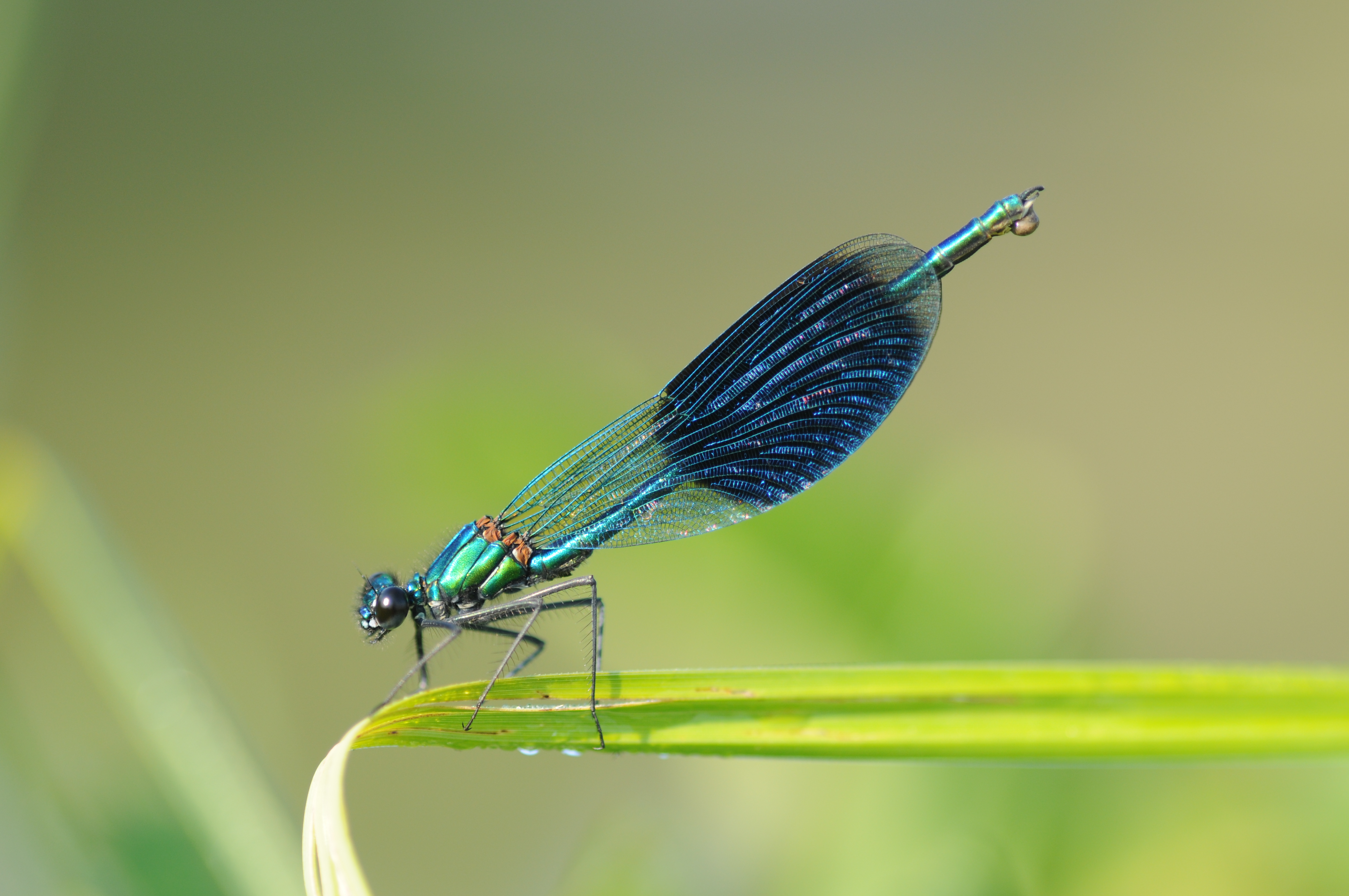 Calopteryx éclatant.